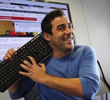 El actor Pablo Chiapella durante un encuentro digital con los lectores para el diario 20 minutos